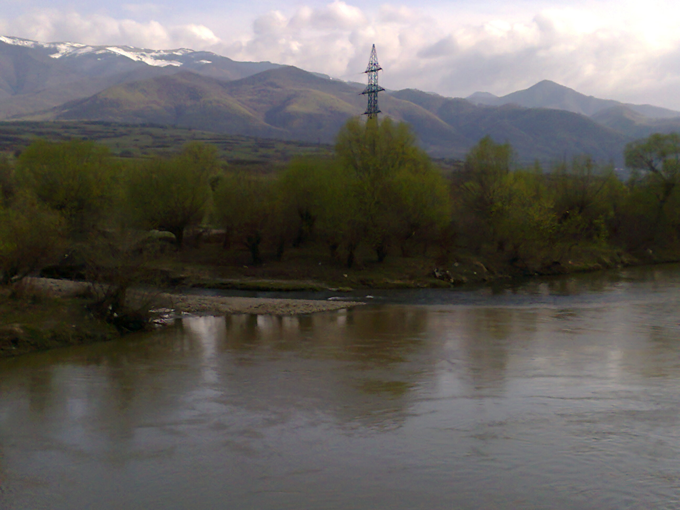 Gura de varsare in Olt a Sebesului.